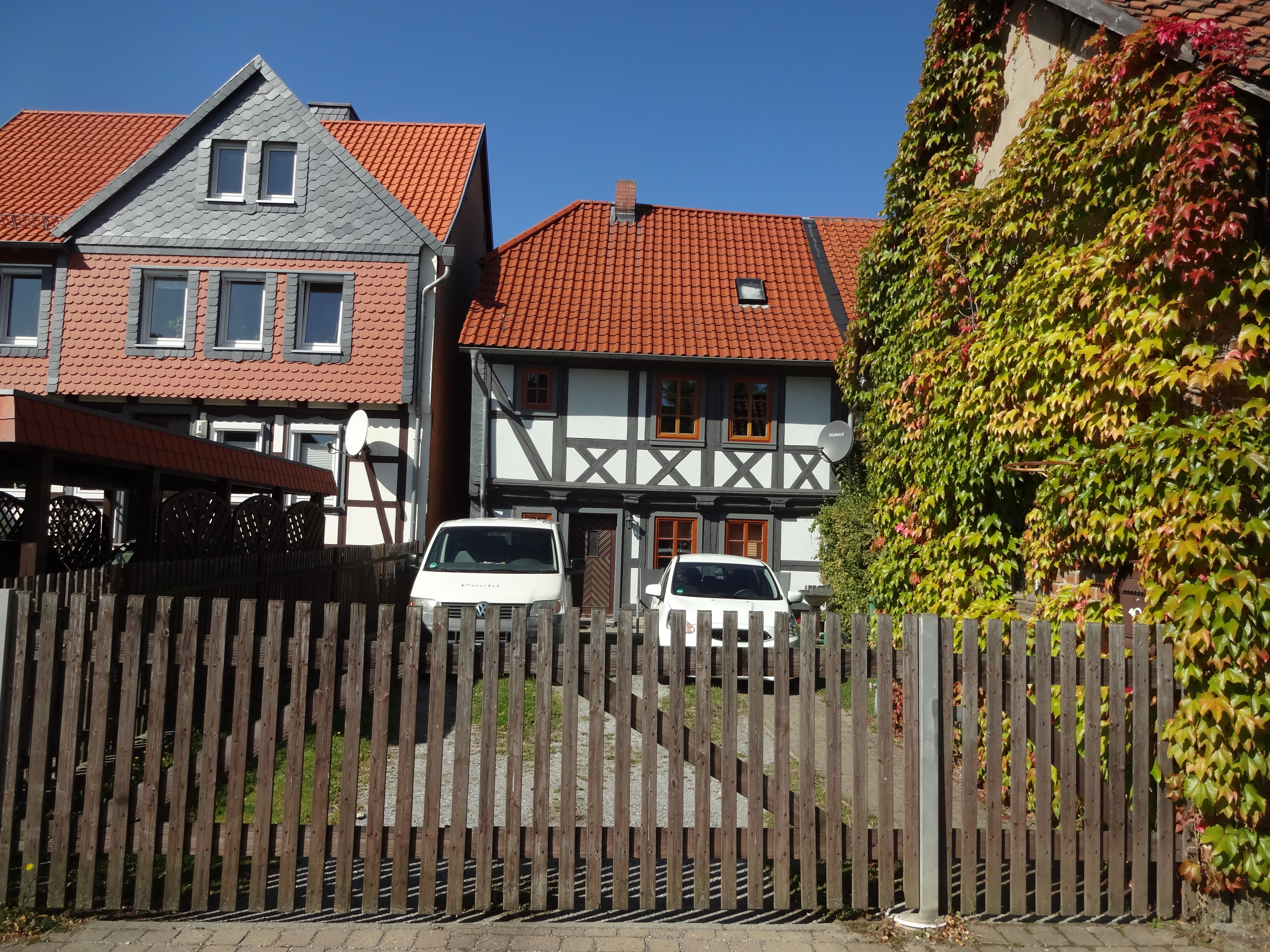 denkmalgeschütztes Wohnhaus in der Straße Auf der Heide 4 in Darlingerode